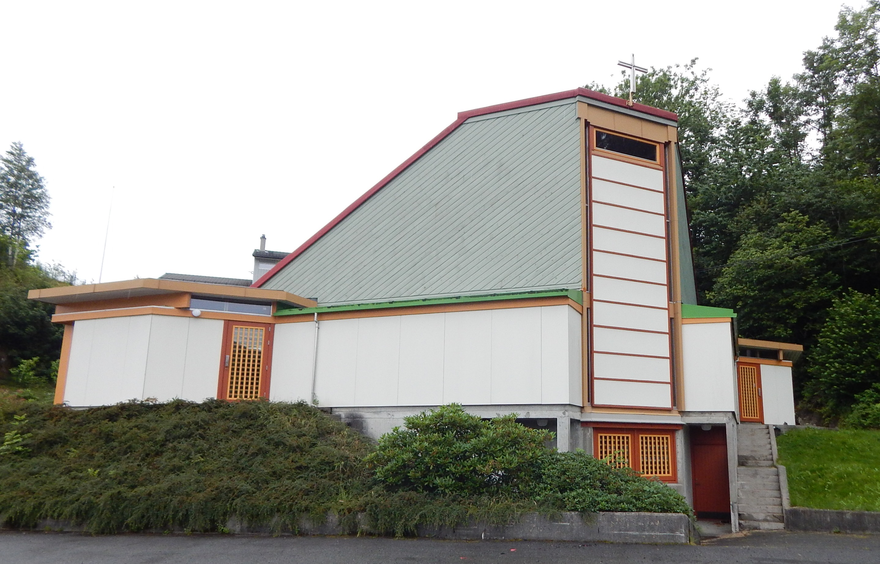 Haga kirke i Samnanger